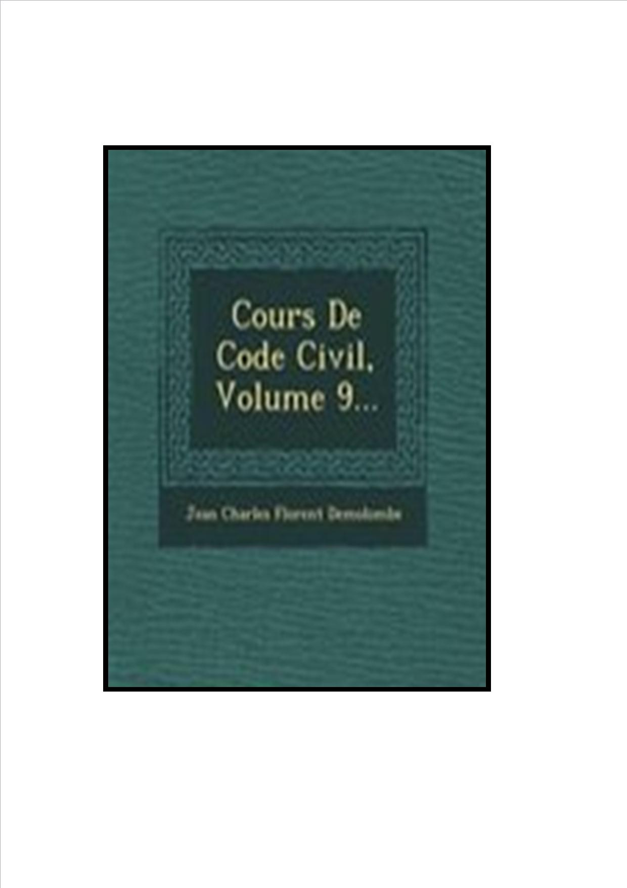 Cours De Code Civil Volume 9 oleh Jean Charles Florent Demolombe